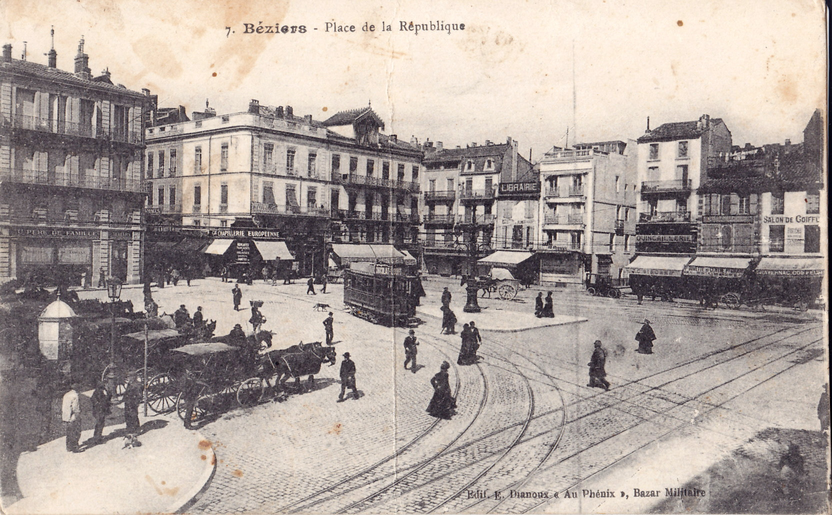 Carte postale ancienne éditée par E. Dianoux "Au Phénix", bazar militaire, n°7 : VEZIERS - Place de la République